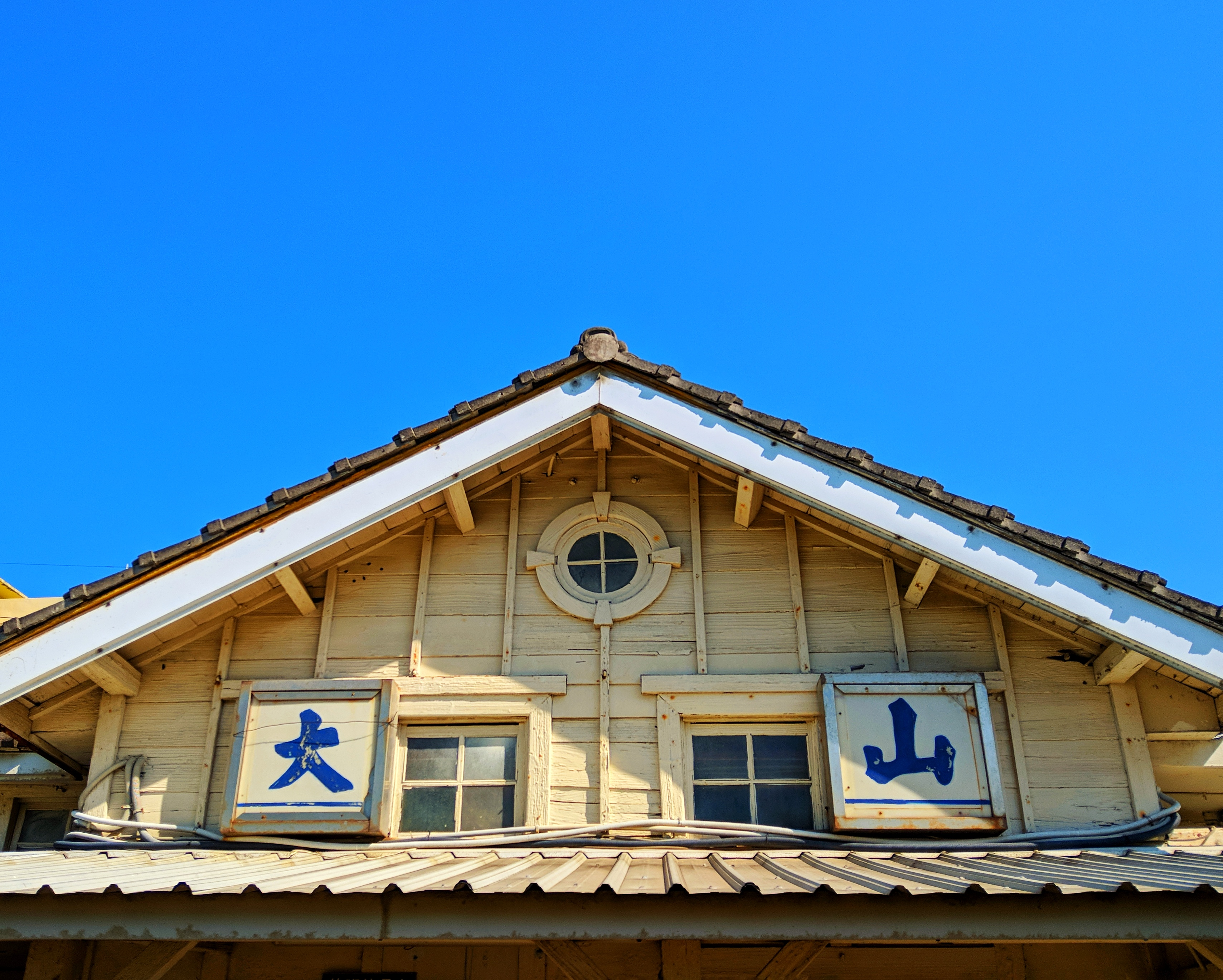 大山車站一景